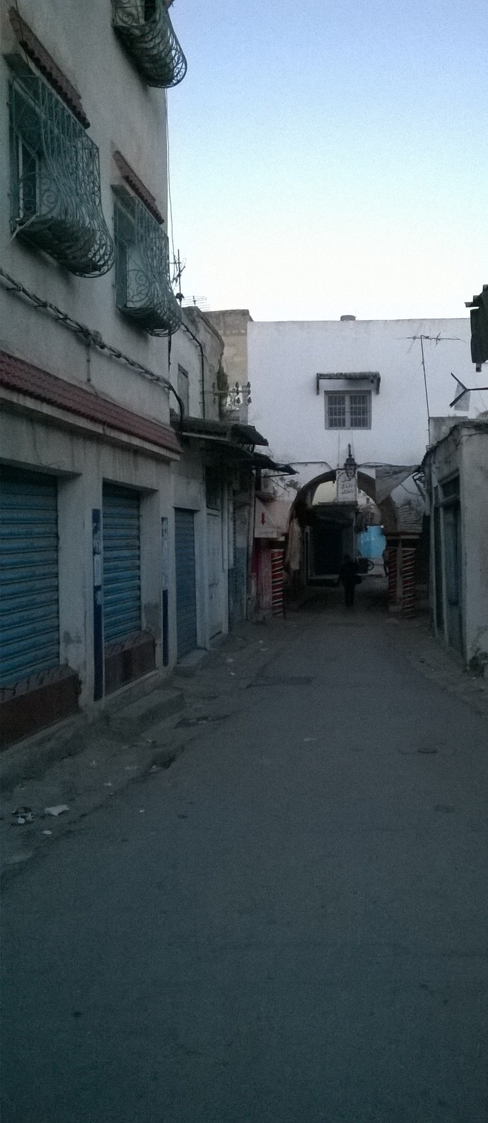 Sidi El Béchir , Tunis سيدي البشير ، تونس